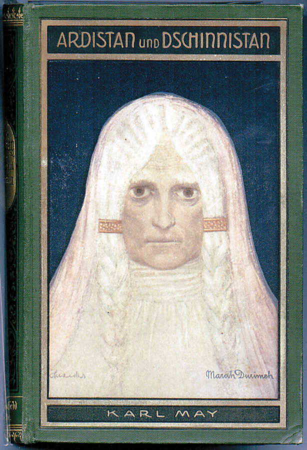 „Marah Durimeh“ - Deckelbild von Sascha Schneider († 1927)